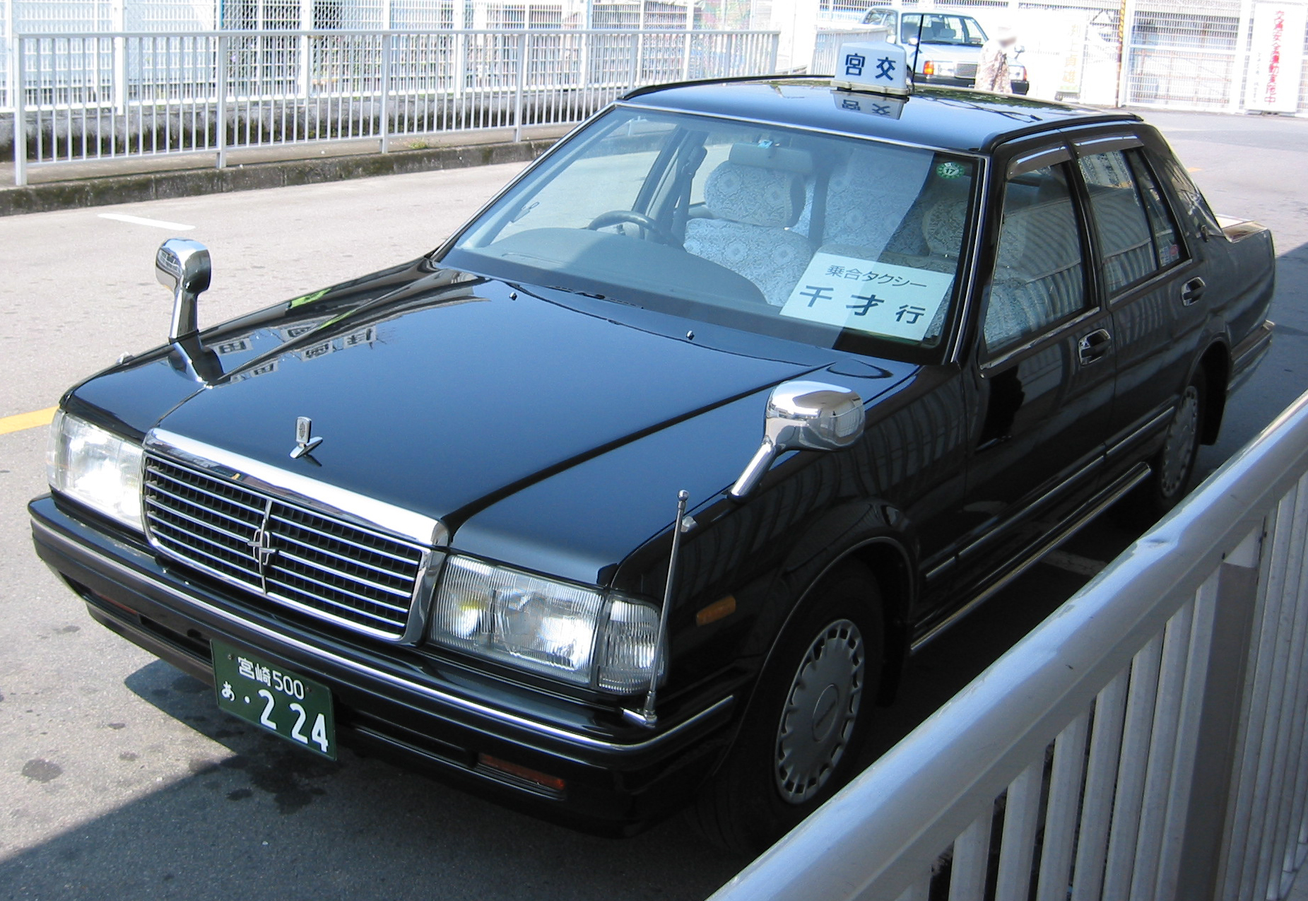 宮交タクシー 乗合タクシー千才行（小林市）の車両